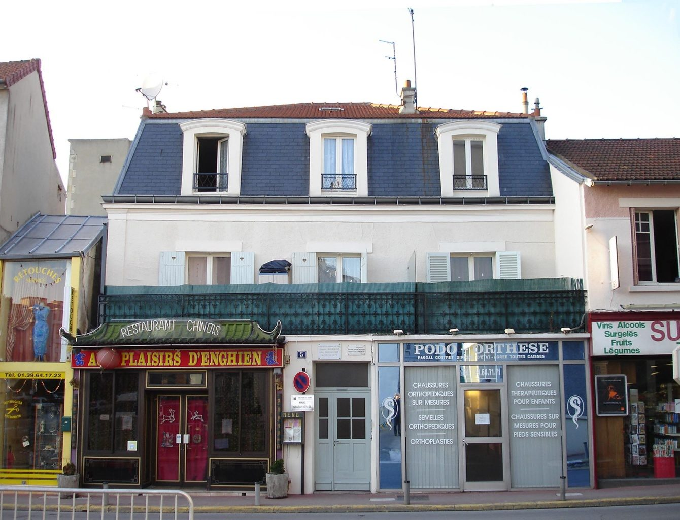 Geburtshaus der Mistinguett in Enghien-les-Bains (Frankreich) - Dezember 2006